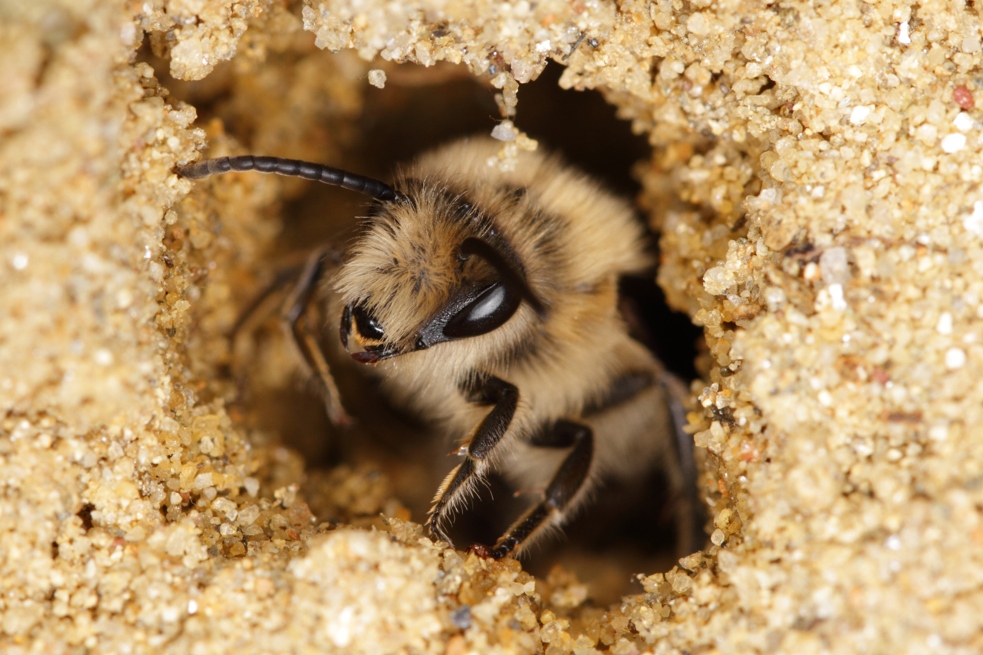 Eine Frühlings-Seidenbiene Colletes cunicularius (Art bestimmt von Hans-Jürgen Martin) im Botanischen Garten Schönbrunns.